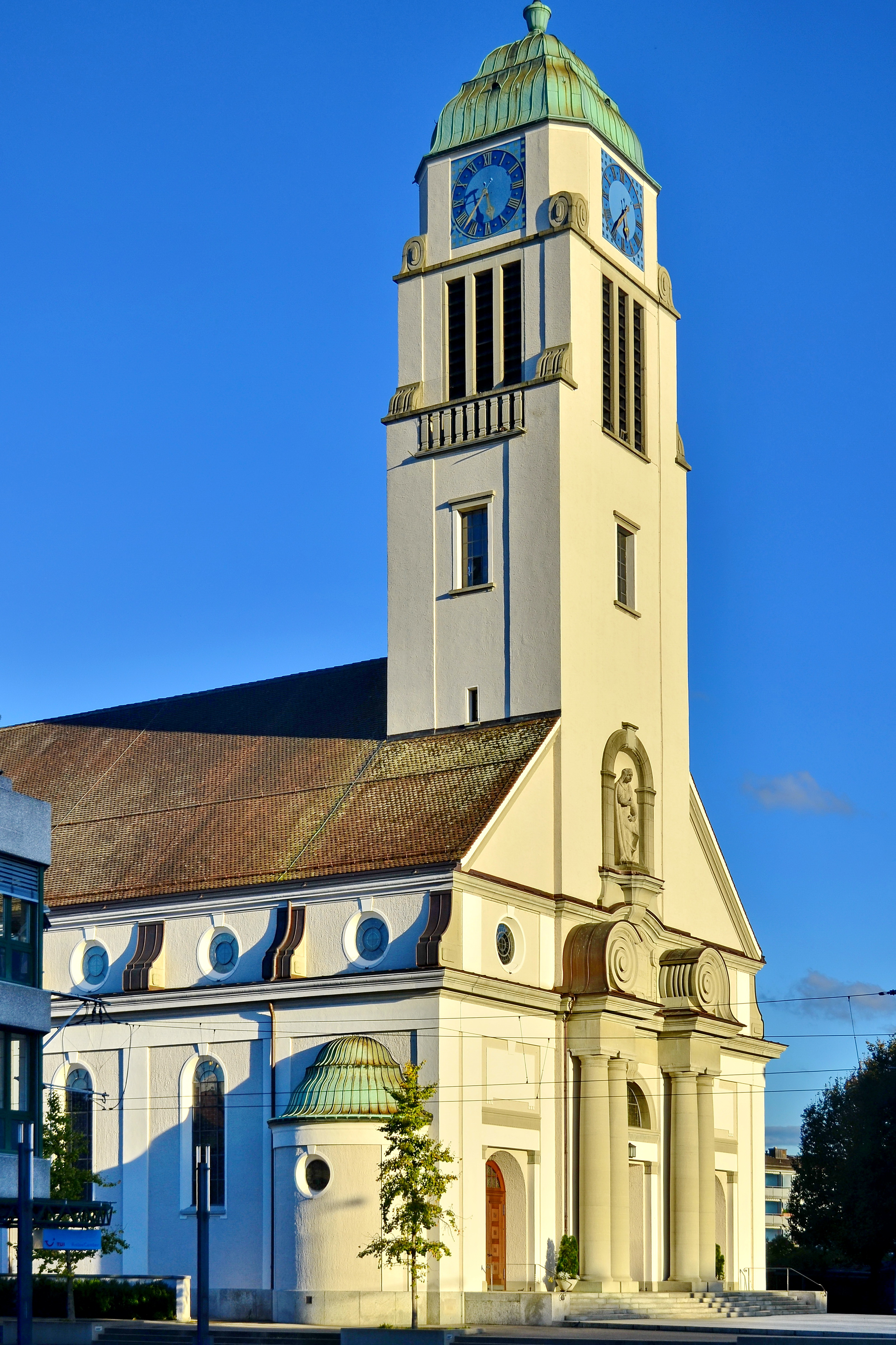 St. Agatha Kirche in Dietikon (Switzerland)